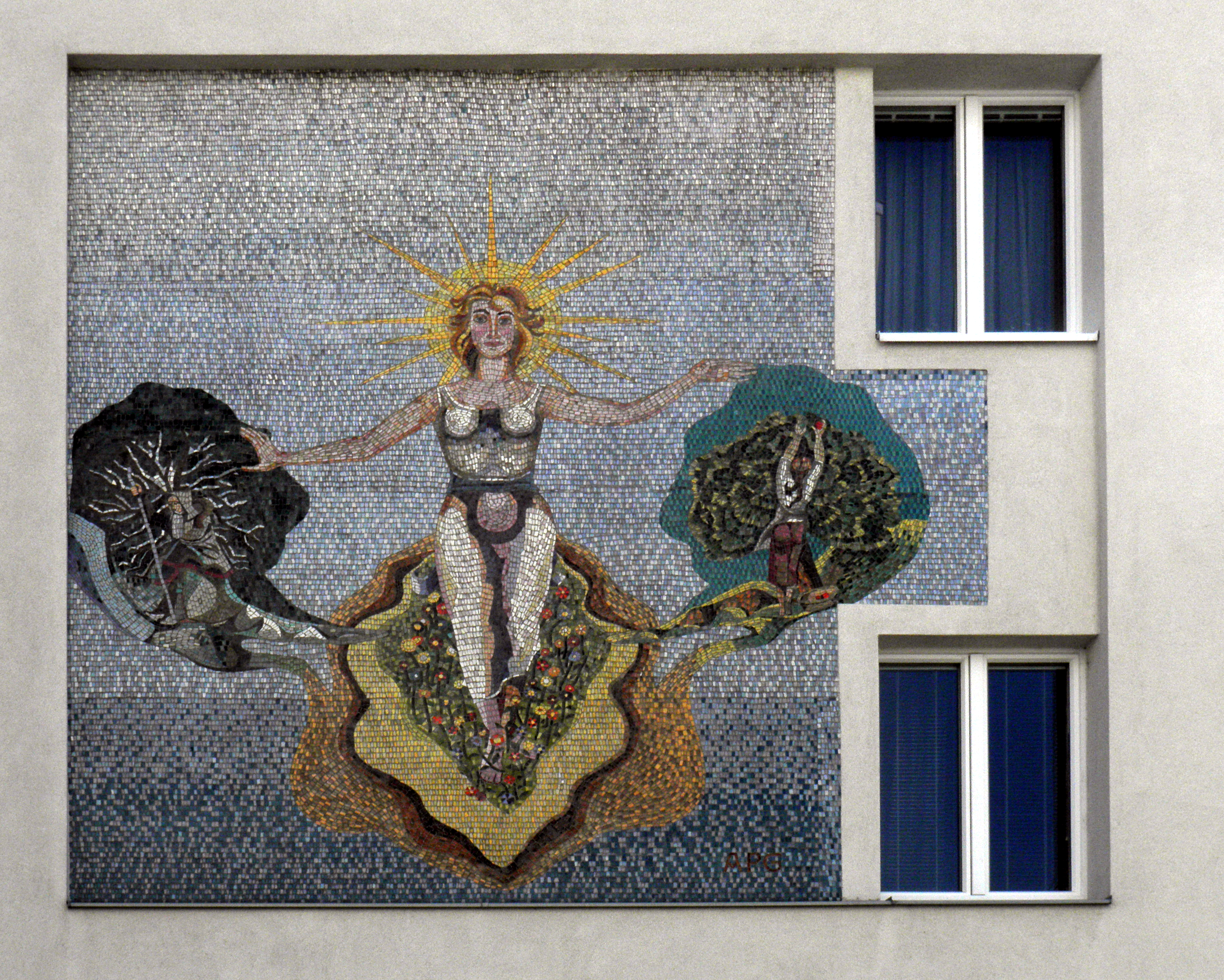 Mosaik - Allegorie des Morgen am Dag-Hammarskjöld-Hof in Wien 21. Matthäus-Jiszda-Strasse 4 Signatur APG - Entstanden 1957-60